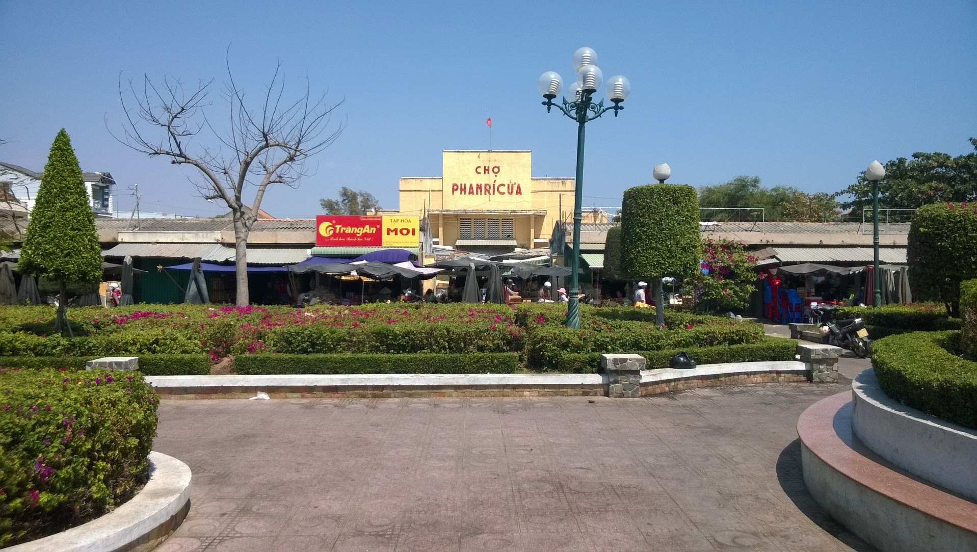 Chợ Phan Rí Cửa (2015), Tuy Phong, Bình Thuận